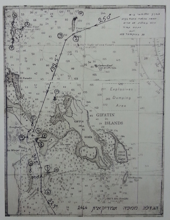 מפת מבצעי מגבית בין השוניות של מעגן הורגדה